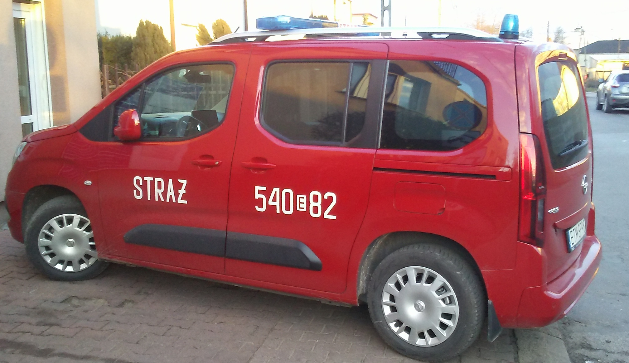 Pojazd serwisowy Państwowej Straży Pożarnej w Tomaszowie Mazowieckim